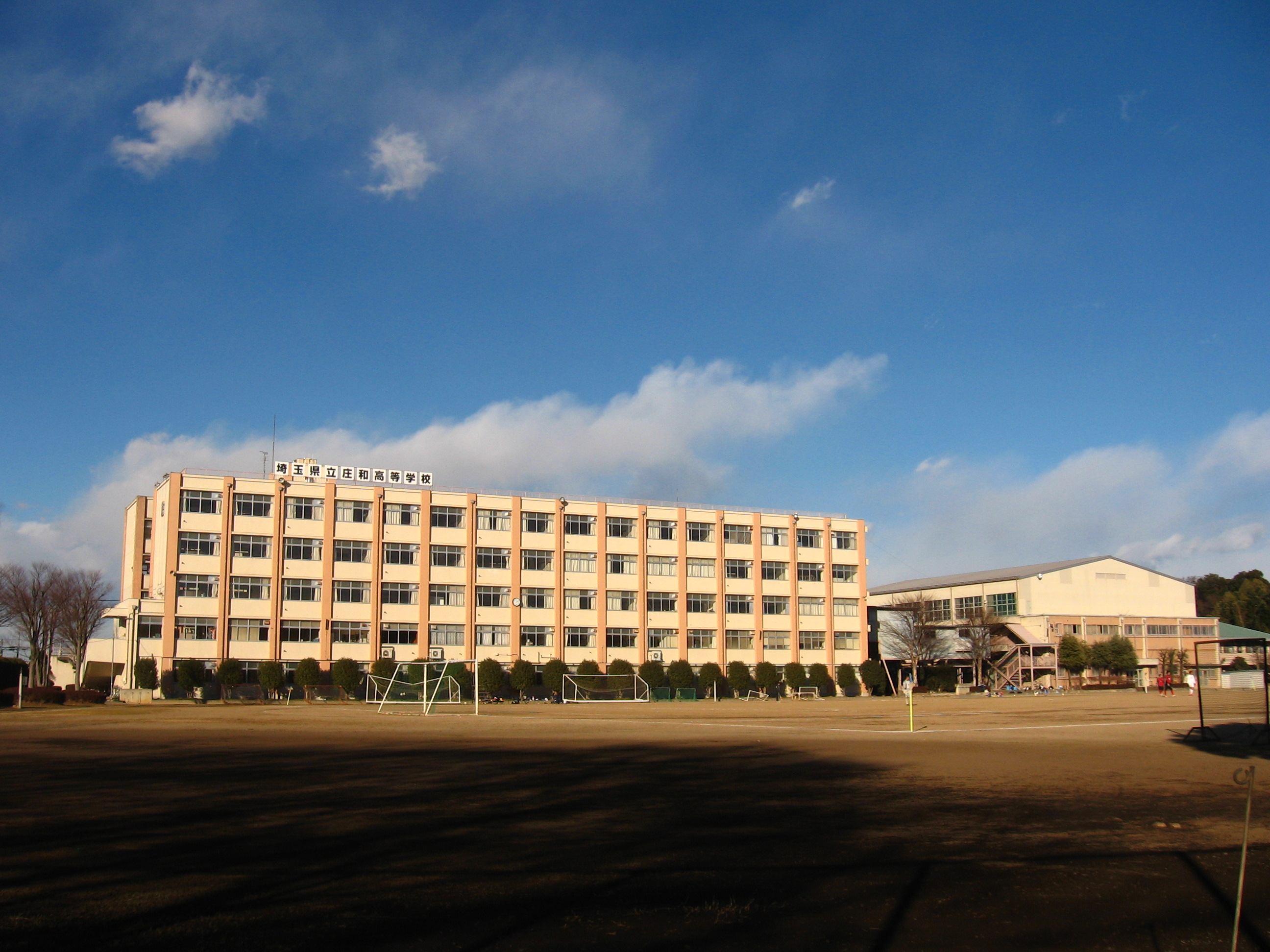 埼玉県立庄和高等学校・校庭側